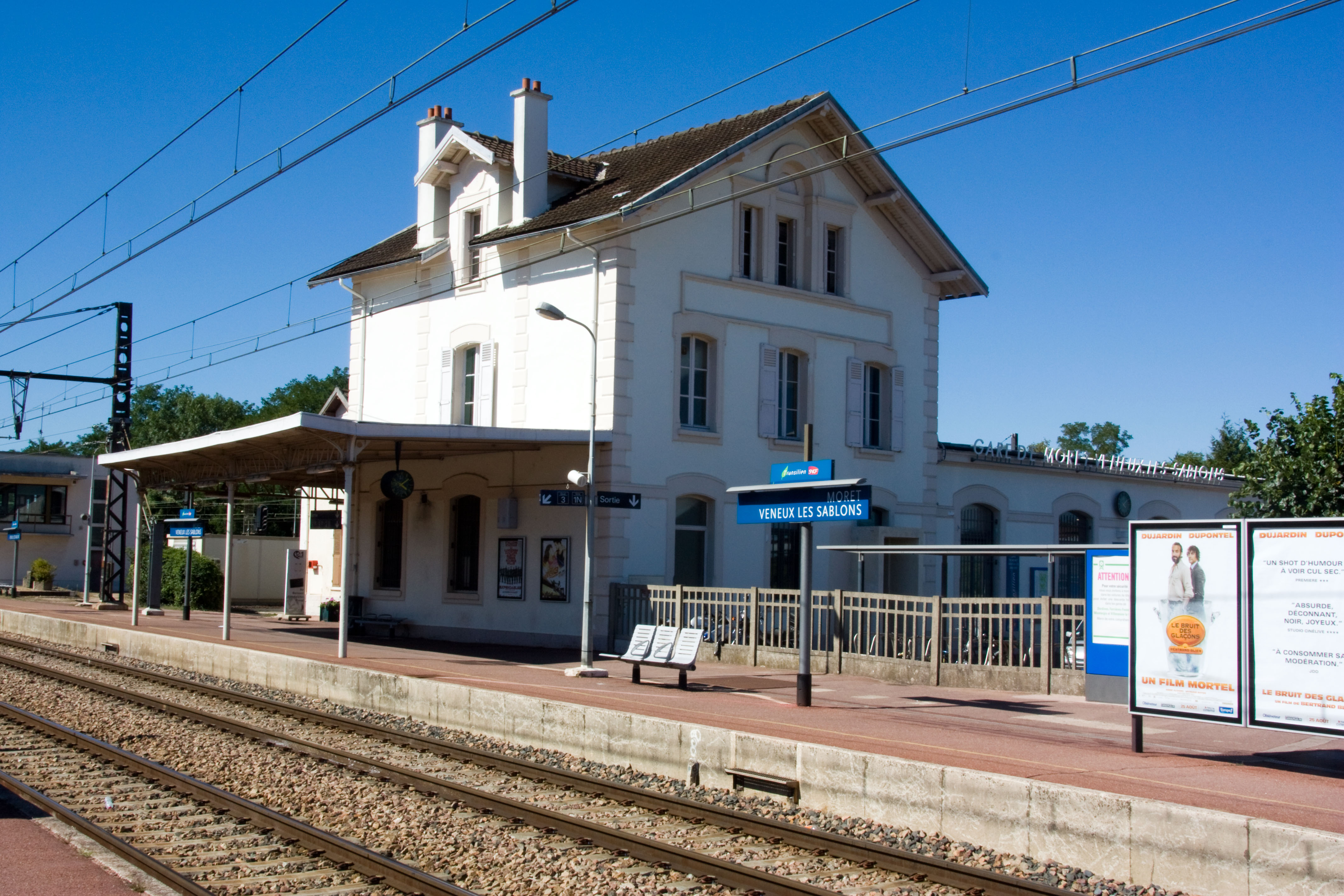 Gare de Moret - Veneux-les-Sablons, Veneux-les-Sablons, Seine-et-Marne, France